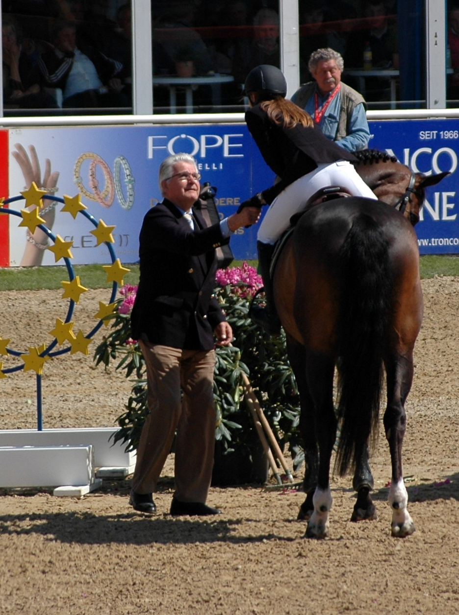 51. Maimarkt-Turnier: Janine Rijkens mit Caro As